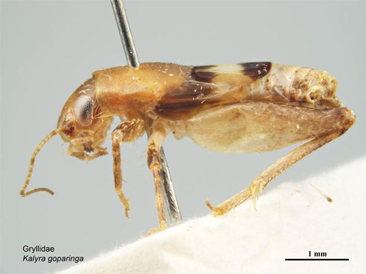 Kalyra goparinga